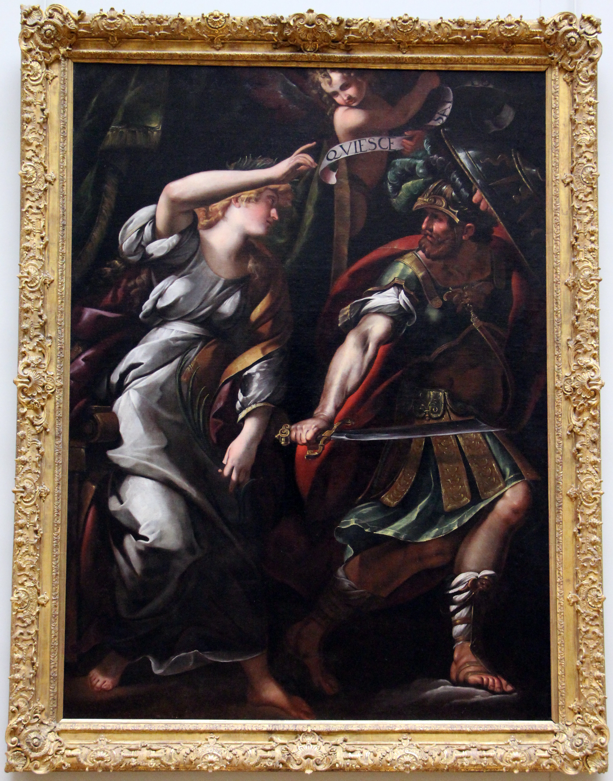 Pittura italiana a Firenze